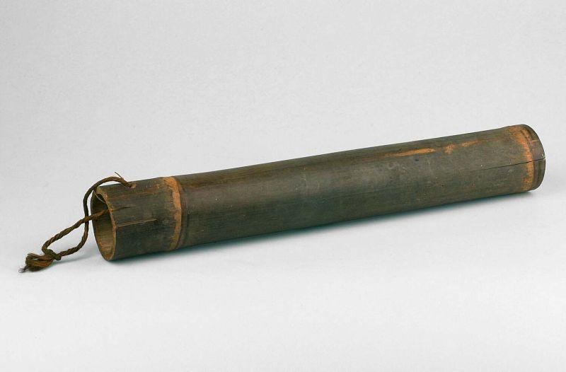 Blaasinstrument. Blaasinstrument van bamboe Unknown language: Ggong bumbung